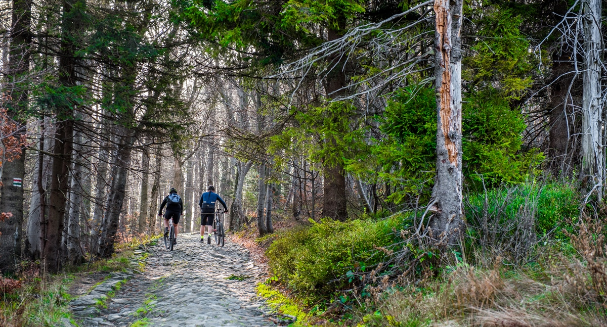 Bielsko-Biała szlak na Szyndzielnię